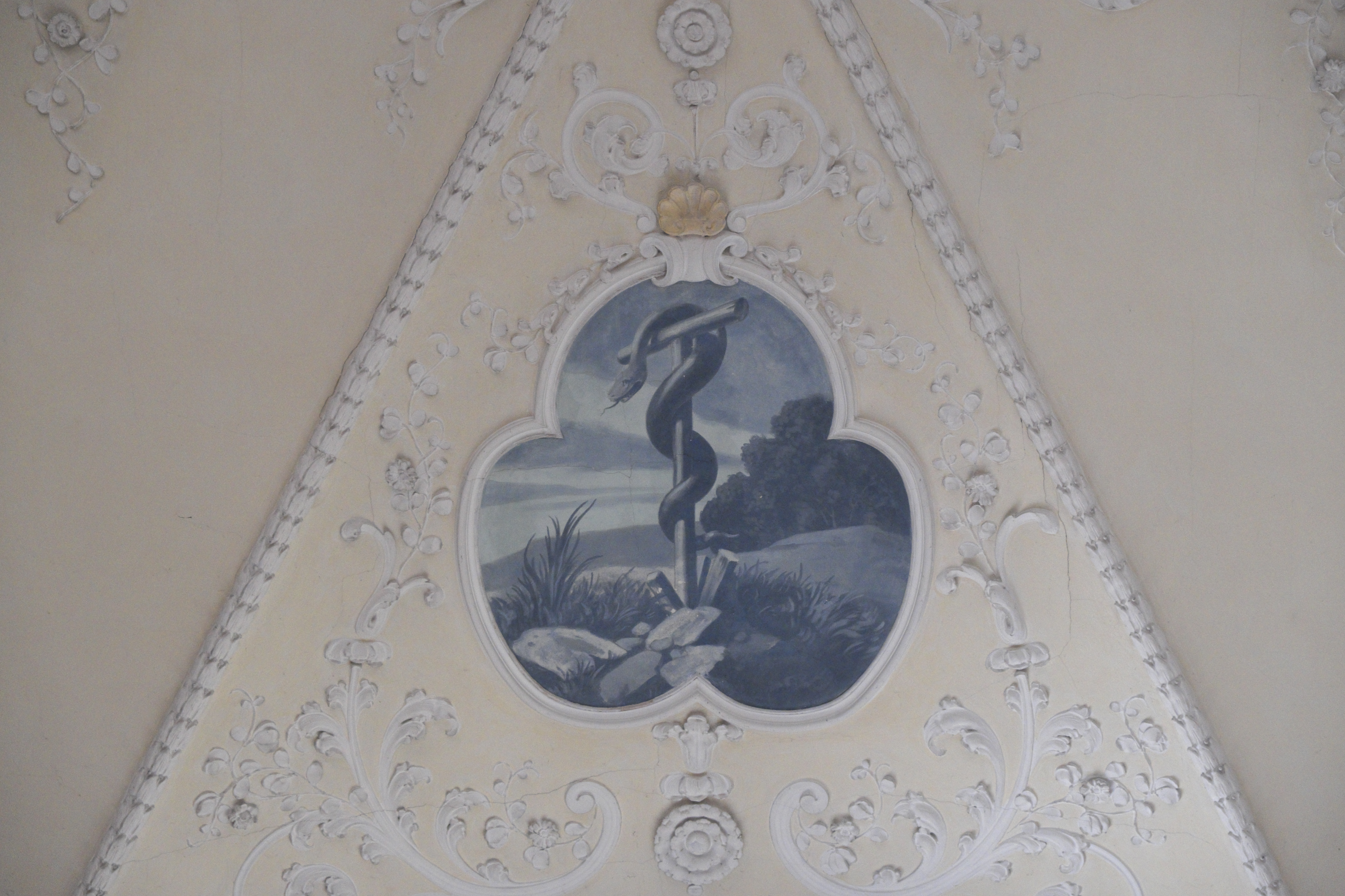 Katholische Klosterkirche der Pauliner St. Peter und Paul, ehemalige Wallfahrtskirche St. Salvator, in Mainburg im niederbayerischen Landkreis Kelheim (Bayern/Deutschland), Stuckdekor von 1906, Deckenmalerei von Georg Halter, von 1906; Medaillon mit Grisaille-Malerei; Darstellung: Eherne Schlange